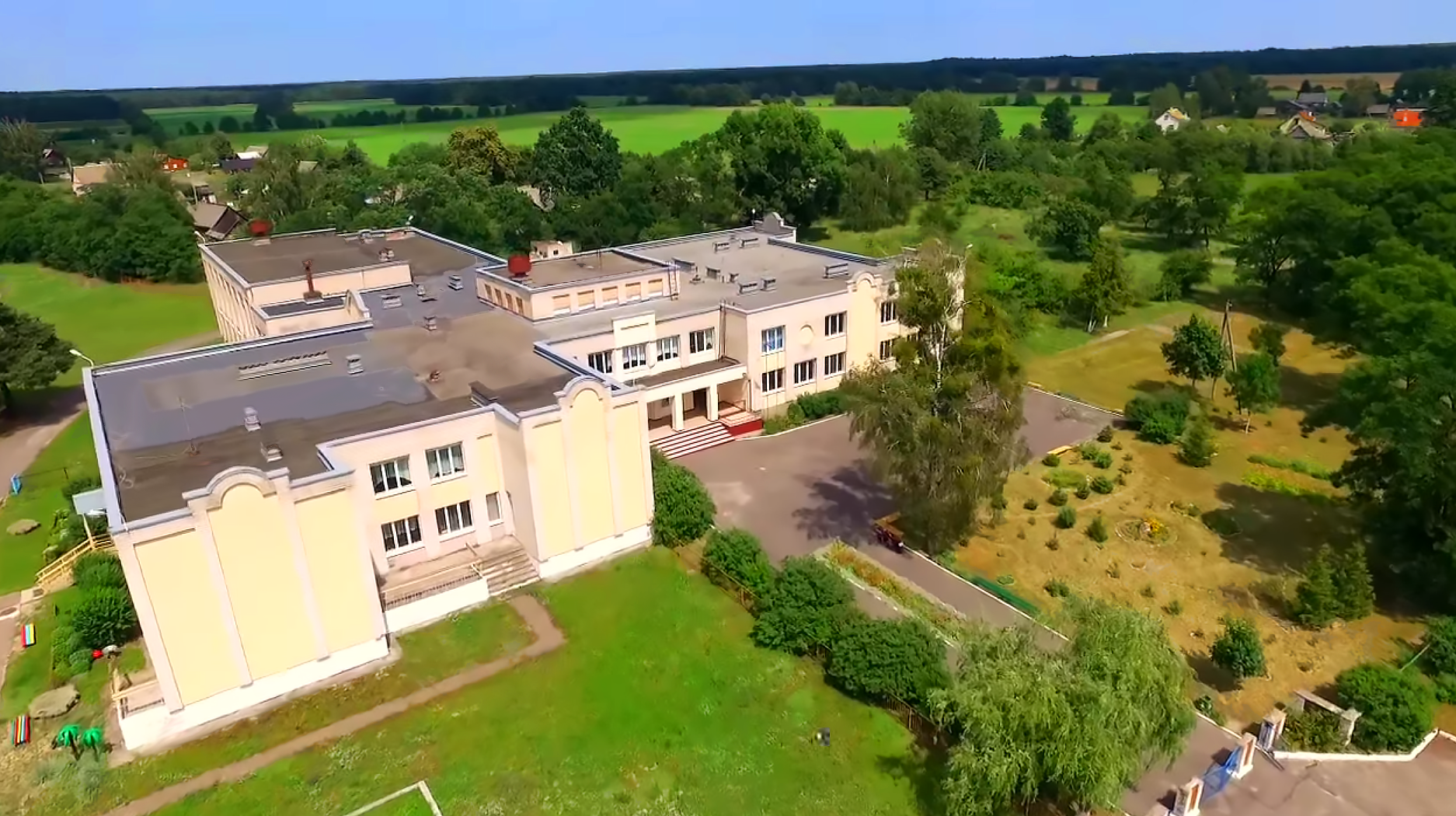 СШ и детсад аг. Медно